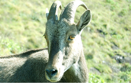 വരയാട്